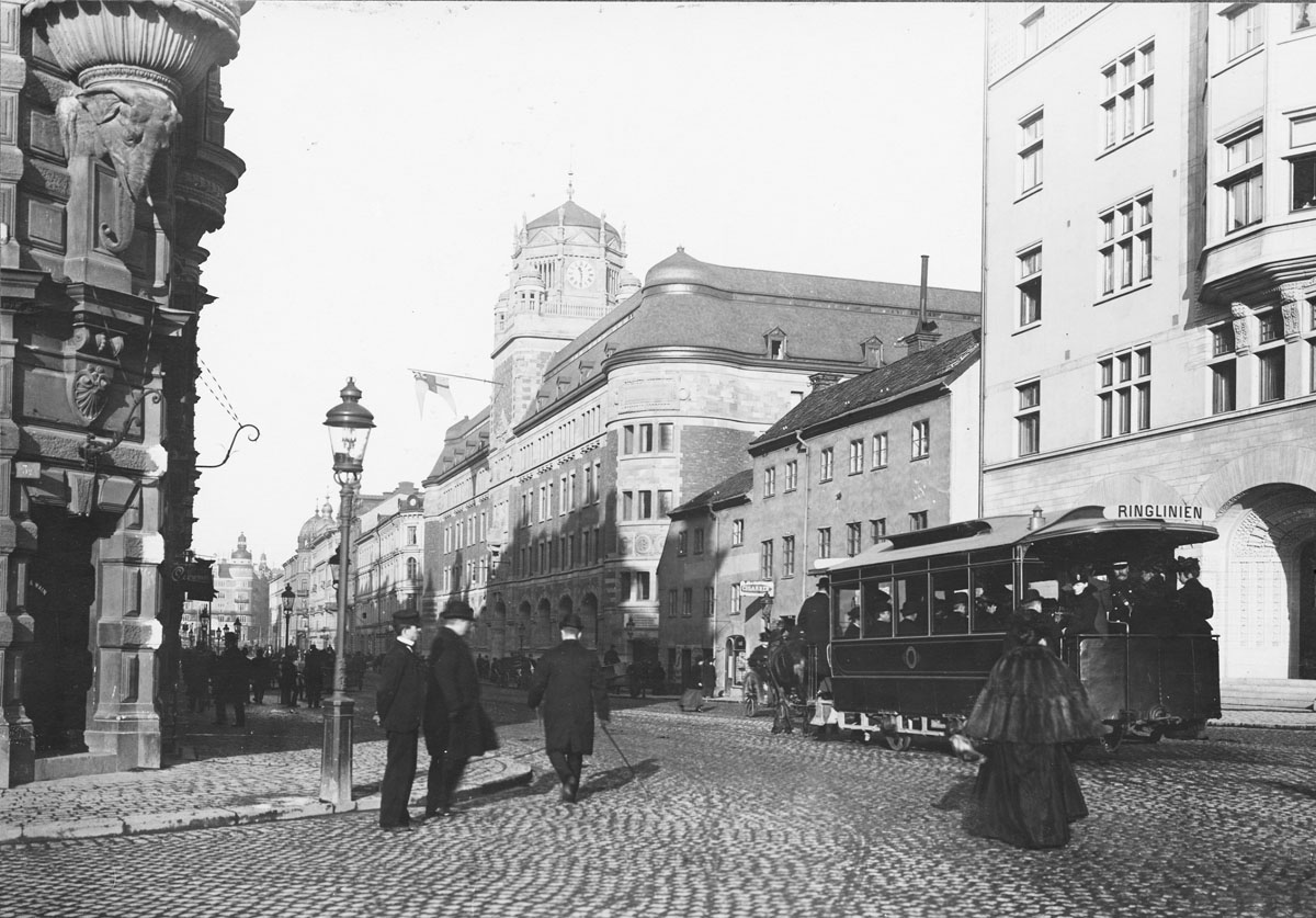 Hästspårvagn på Vasagatan i Stockholm, år 1904. Centralposthuset.